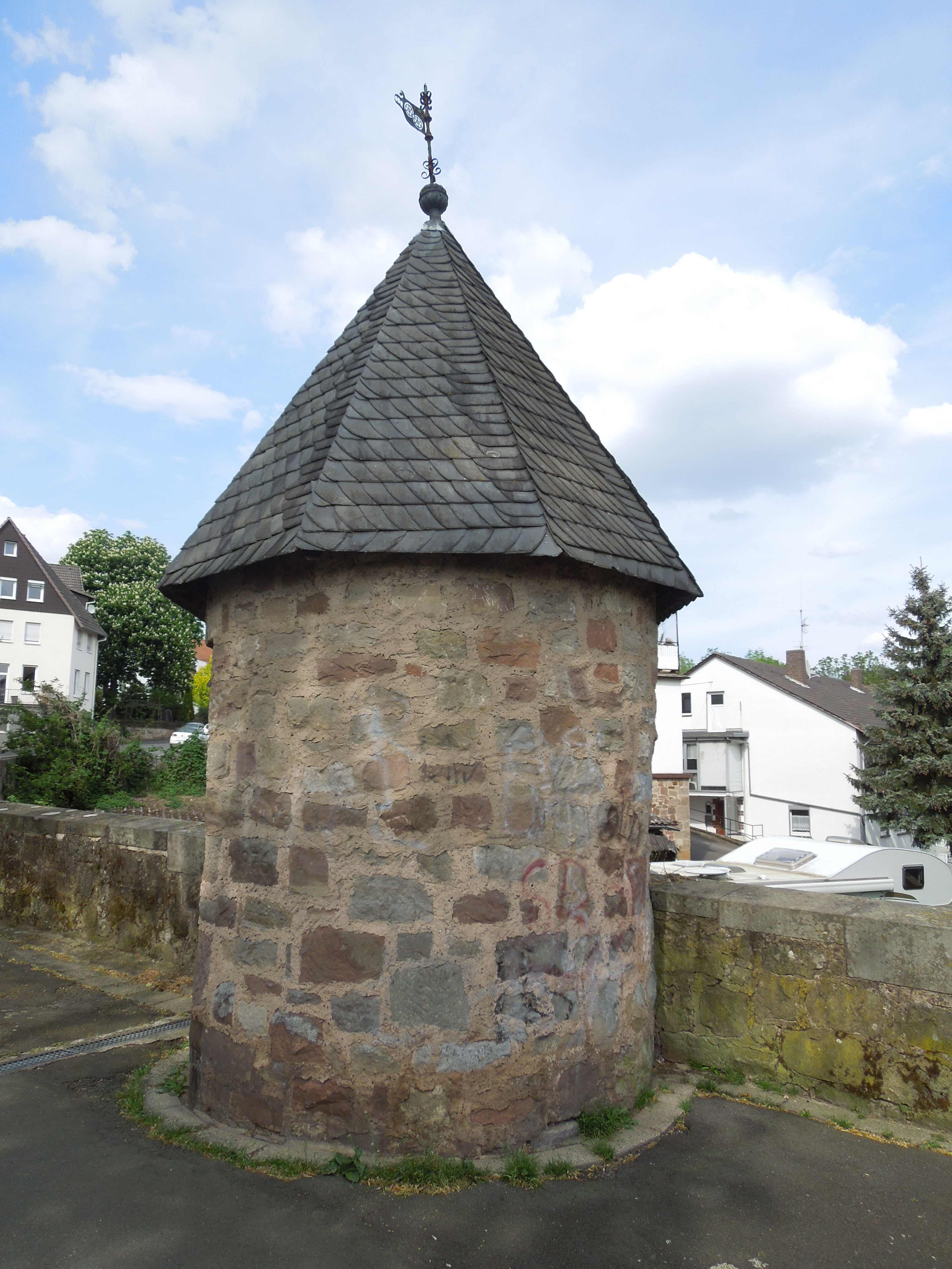 Restored chapel on the 13th century bridge across the river Eder in Fritzlar